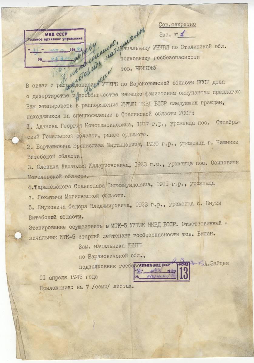 Янукович Федір: архівне фото